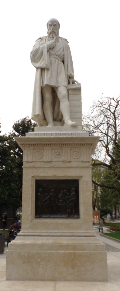 Michele Sanmicheli- Skulptur auf dem Piazza Pradaval in Verona